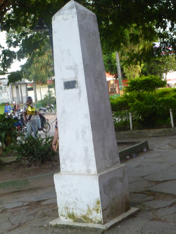 Cette borne marque la frontière entre la ville colombienne et la ville brésilienne